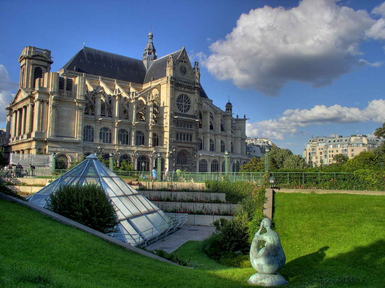 Eglise Saint-Eustache Paris France